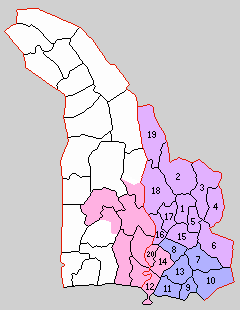 鎌倉郡の町村。